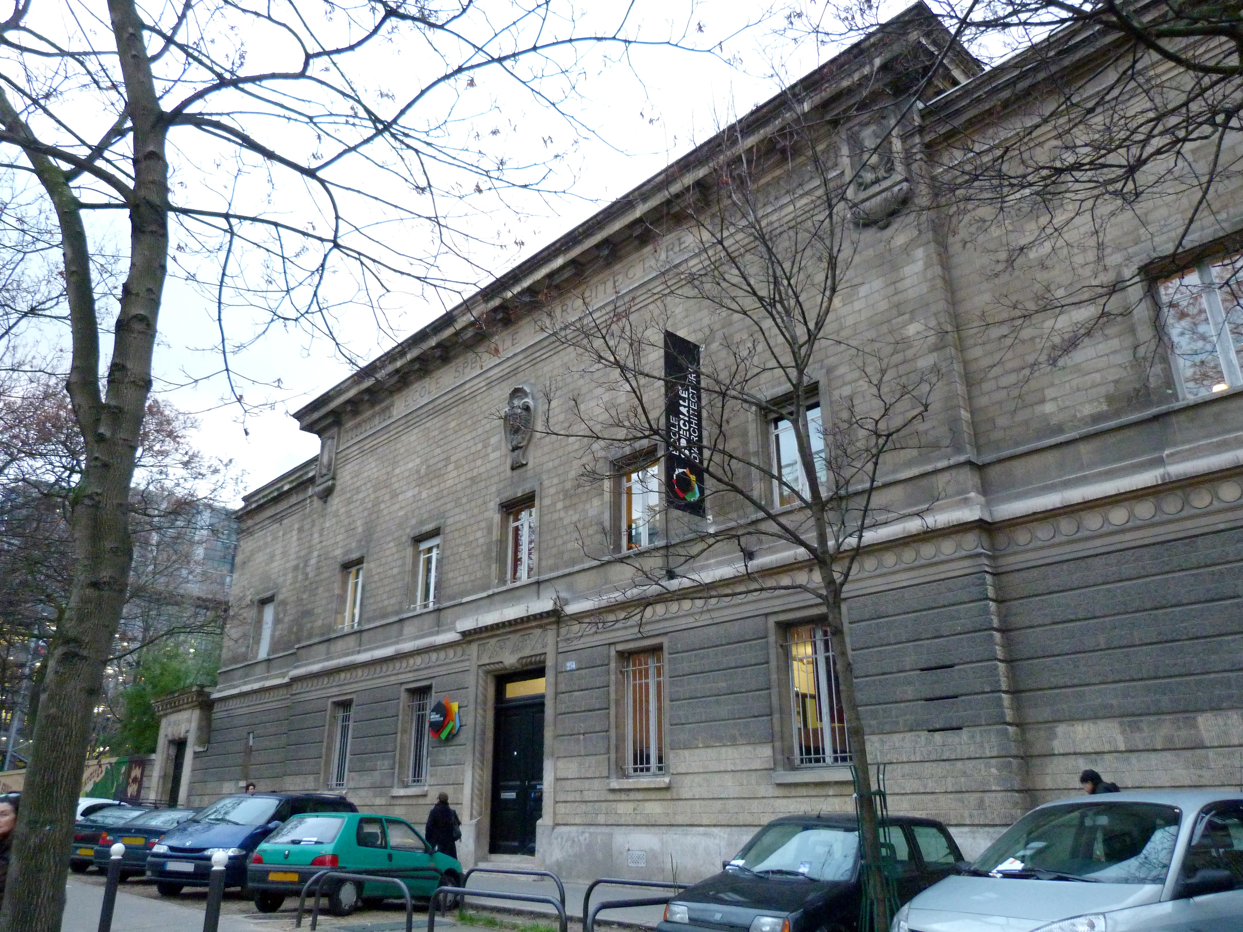 Façade de l'École spéciale d'architecture de Paris (ESA) au n°254, boulevard Raspail, Paris (14e arrond.).